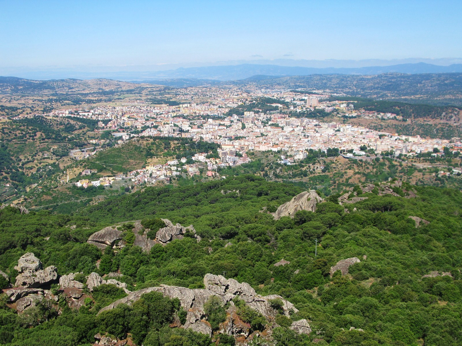 Città di Nuoro